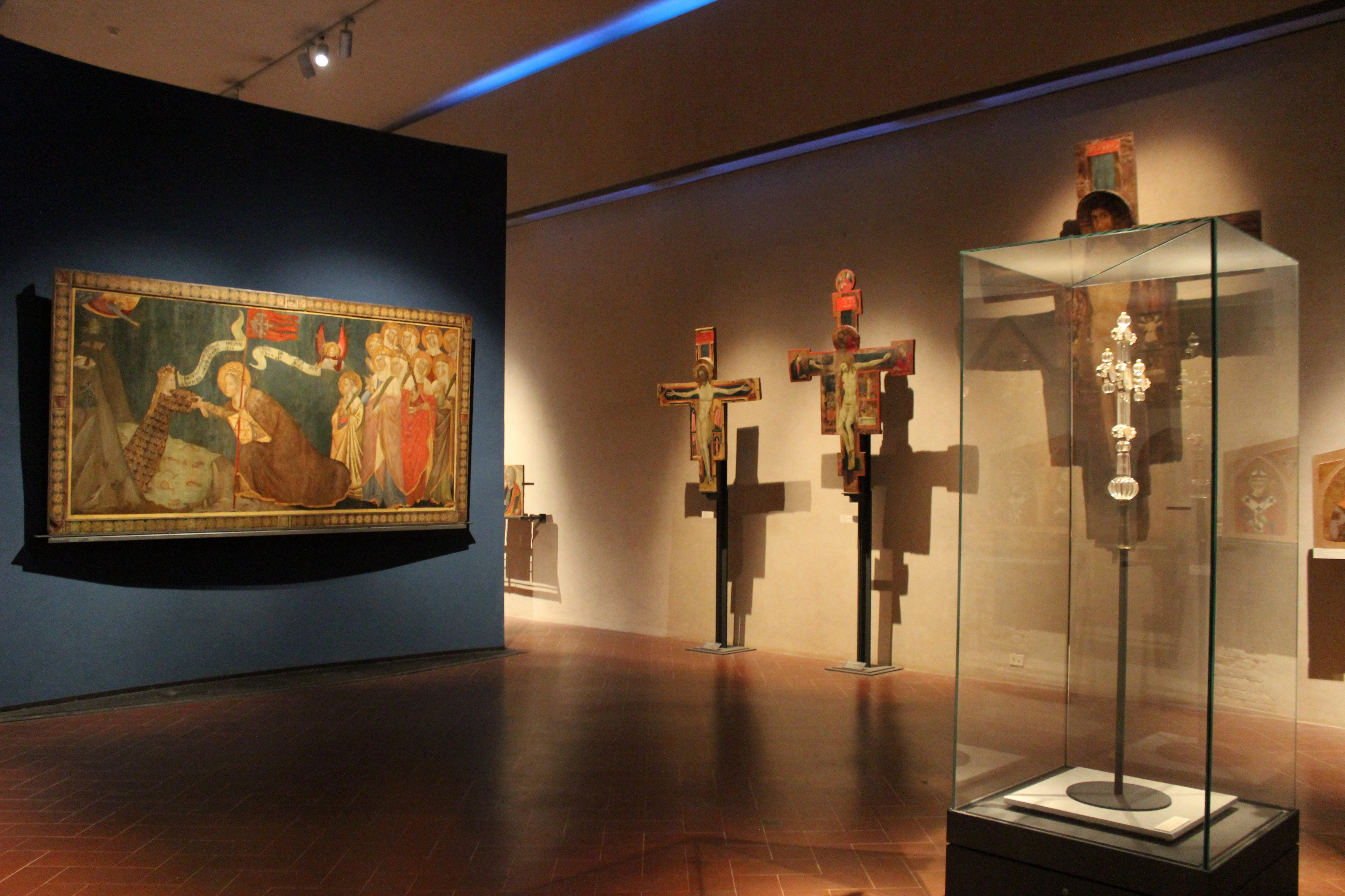 Pisa. Museo Nazionale di San Matteo. Interior.